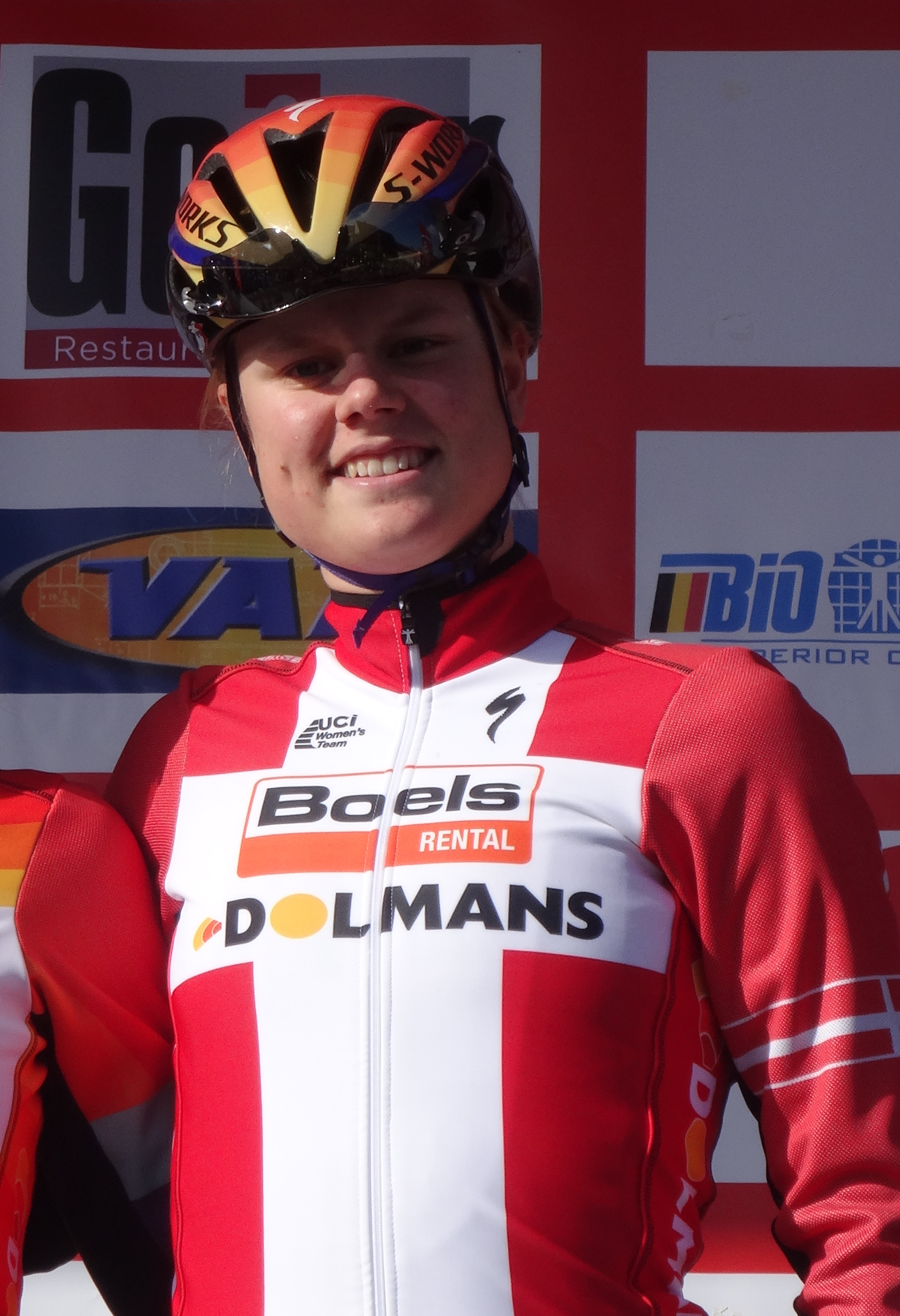 Reportage réalisé le mercredi 4 mars à l'occasion du départ du Samyn des Dames 2015 et du Samyn 2015 à Quaregnon, Belgique.